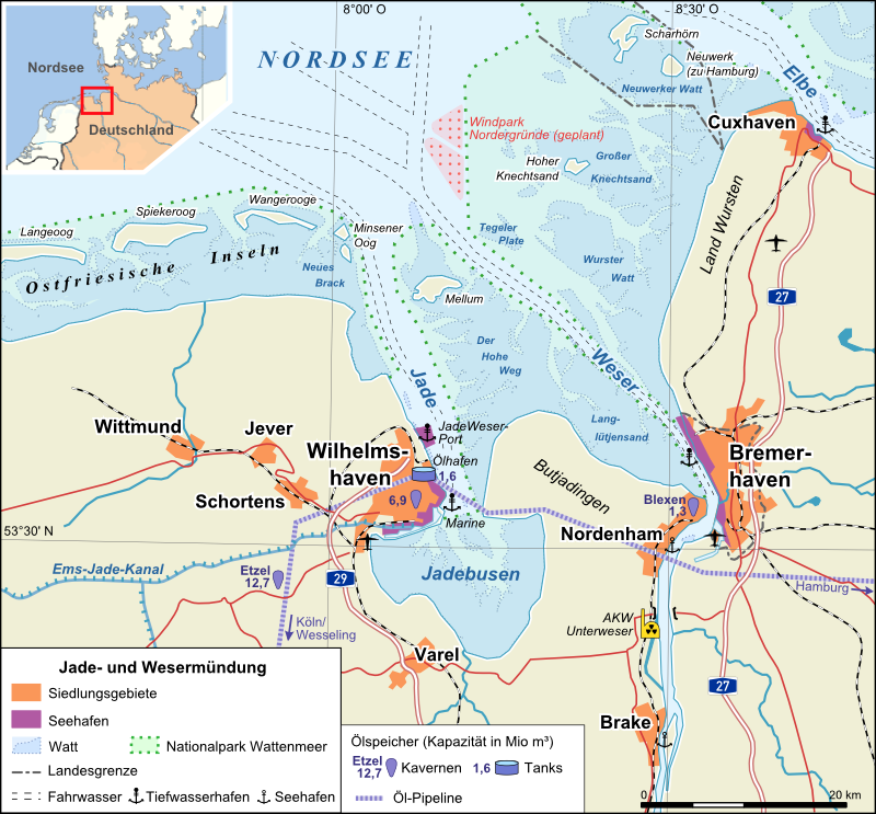 Übersichtskarte Jade- und Wesermündung